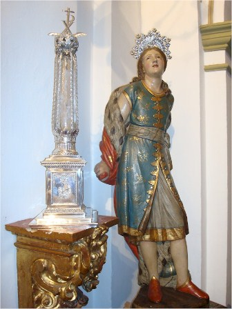 Imagen de San Pelagio de Juan Miguel Verdiguier (1775-1780). Junto a la imagen, el relicario de plata del orfebre cordobés D. Manuel Aguilar (1794)